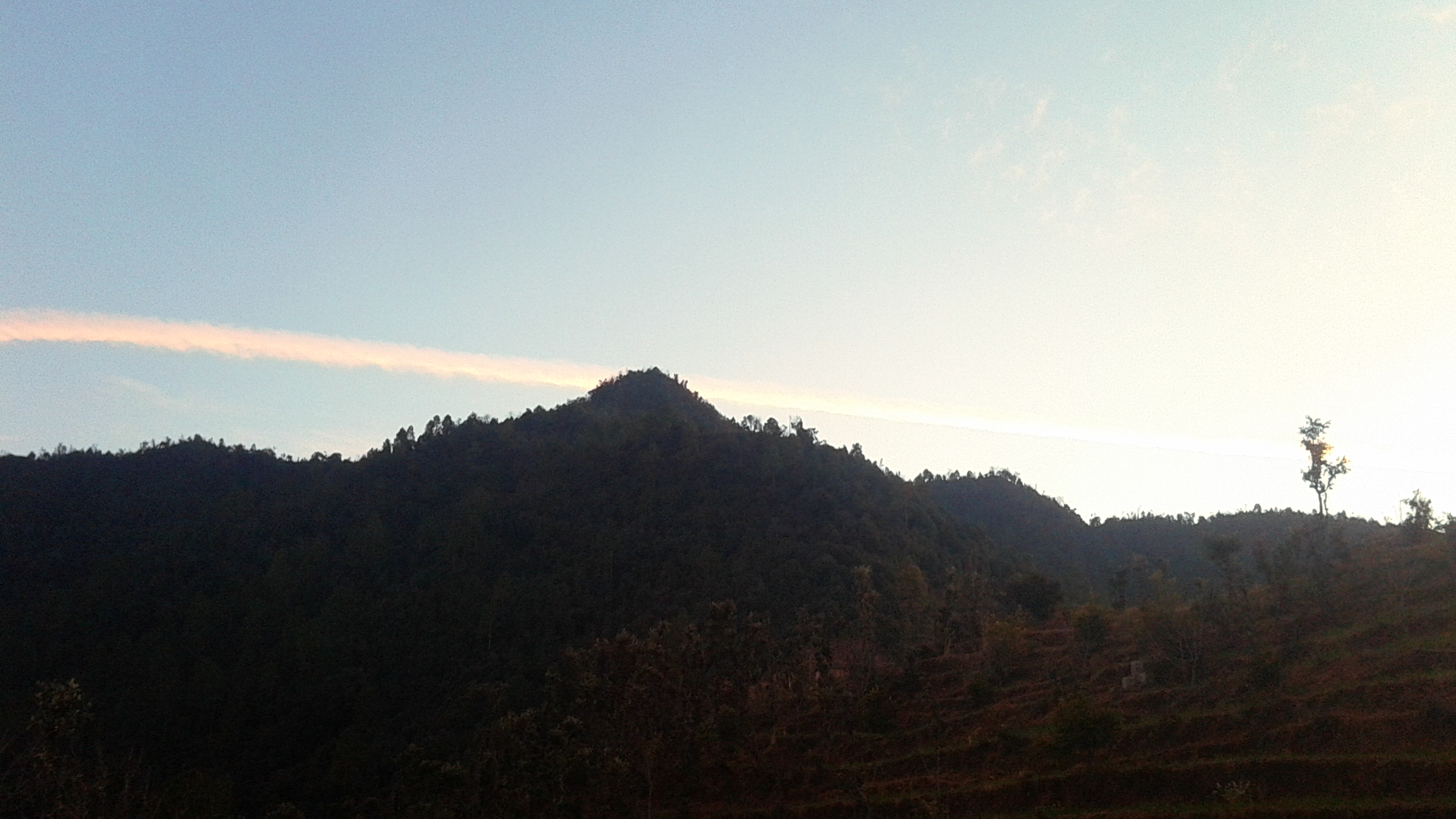 गणेश धुराको एक दृश्य